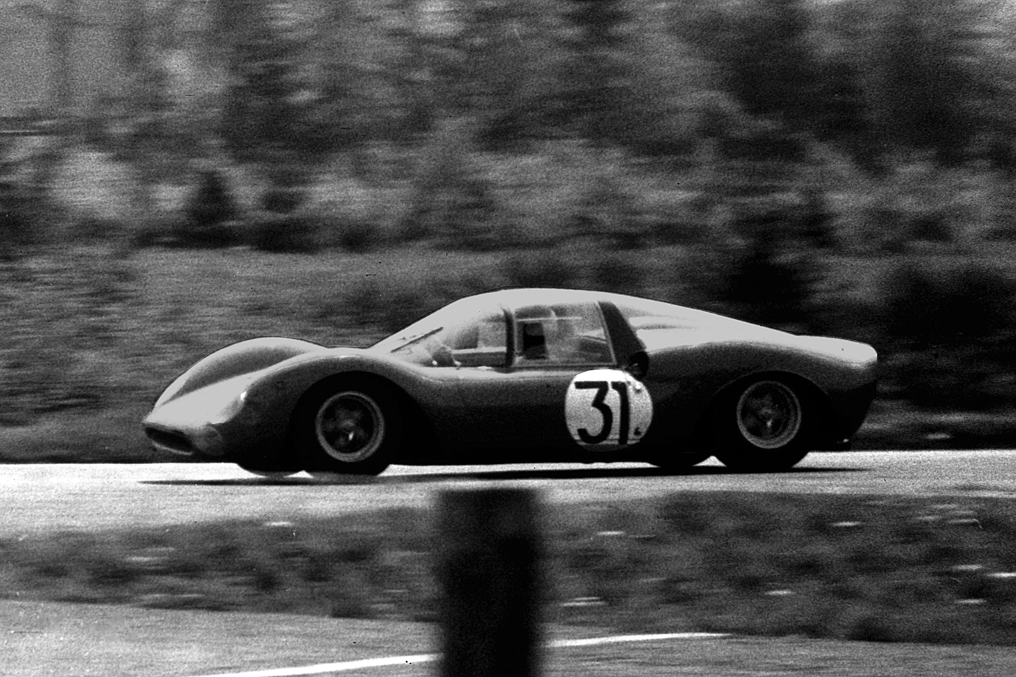 Lorenzo Bandini im Ferrari Dino 166P beim 1000-km-Rennen auf dem Nürburgring ausgangs Südkehre